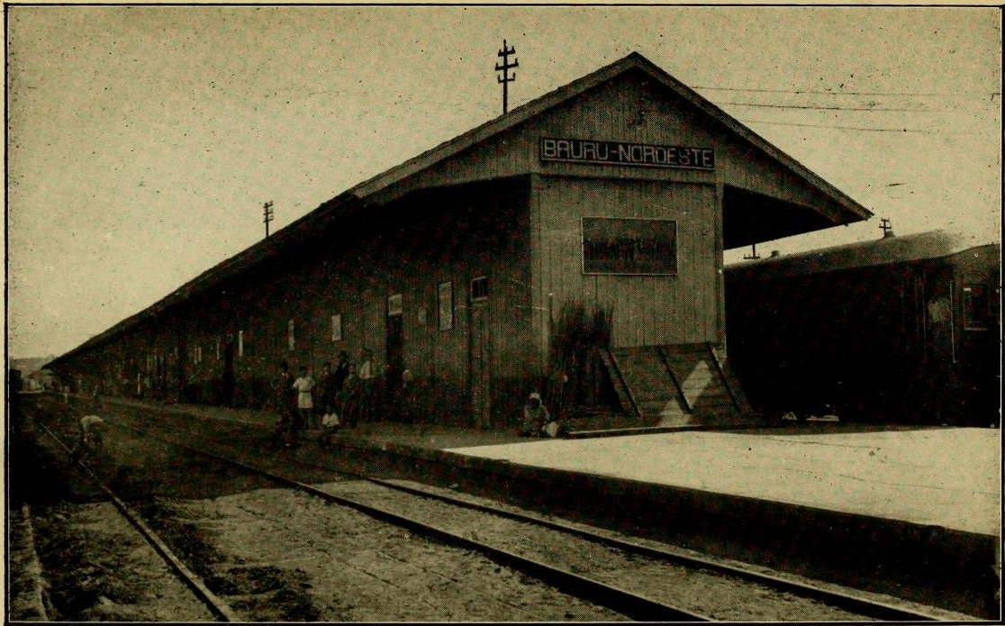 Aspecto da primeira estação ferroviária Bauru da Estrada de Ferro Noroeste do Brasil.